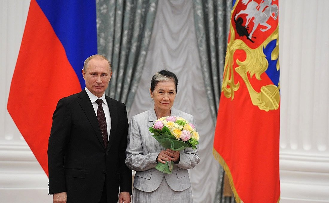 Орденом Почёта награждена Галина Хованская